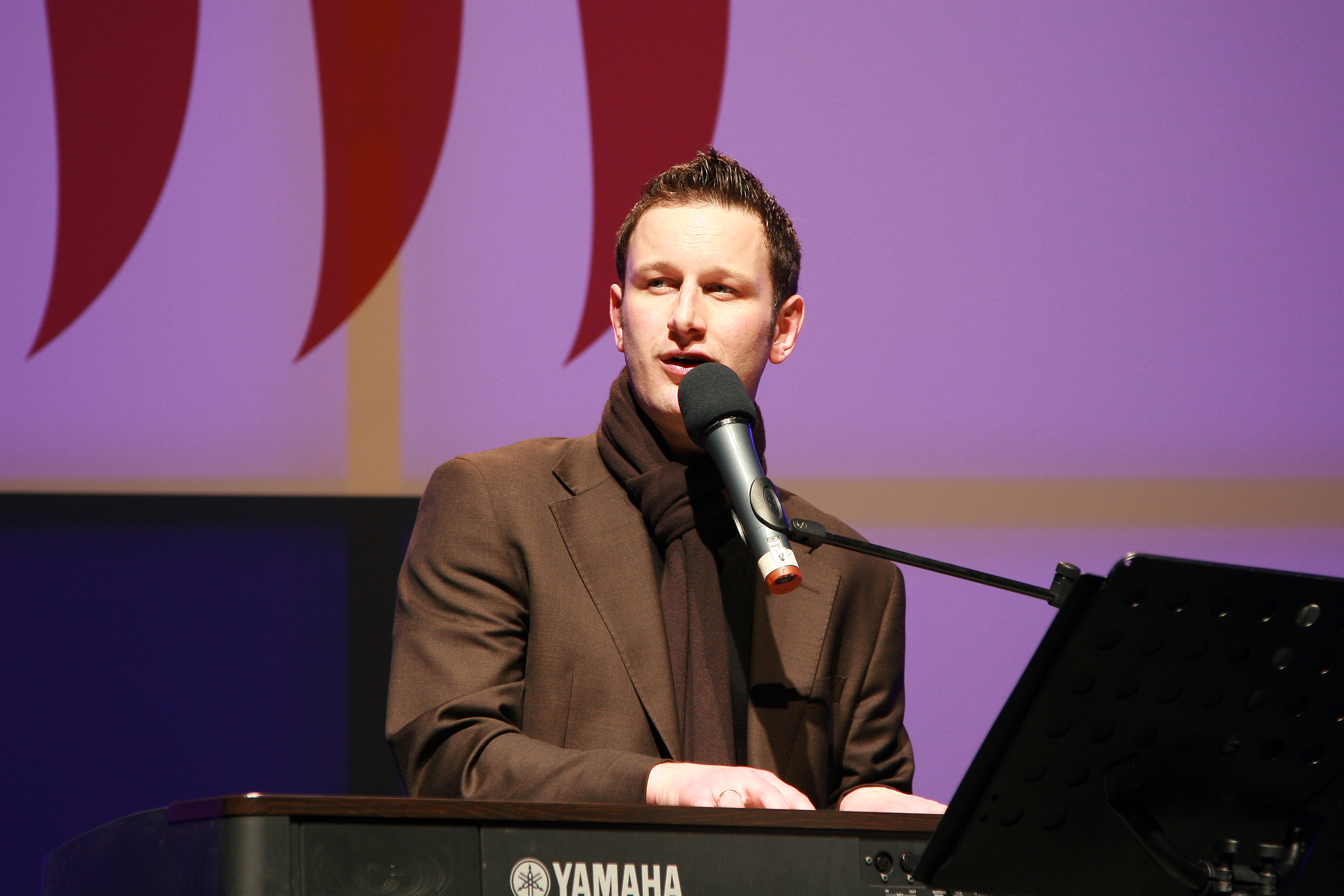 Der christliche Liedermacher Andi Weiss auf dem Kongress christlicher Führungskräfte 2011 in Nürnberg